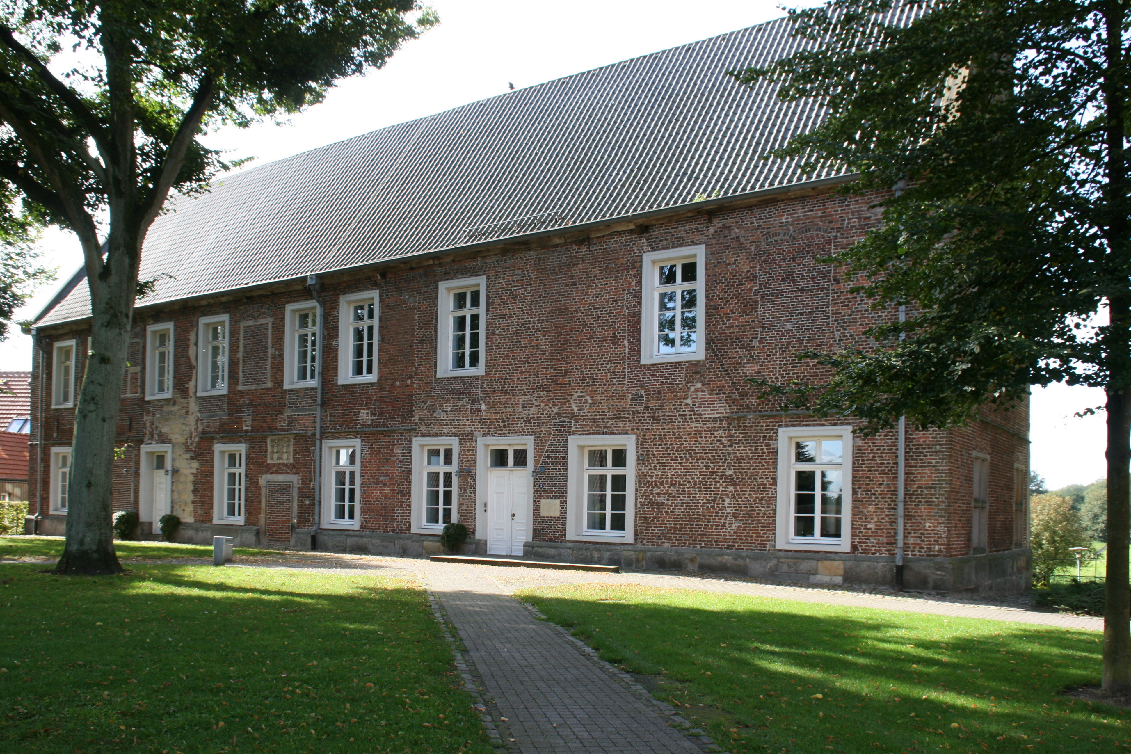 Langes Haus, Burg 14-16 in Nienborg, Heek